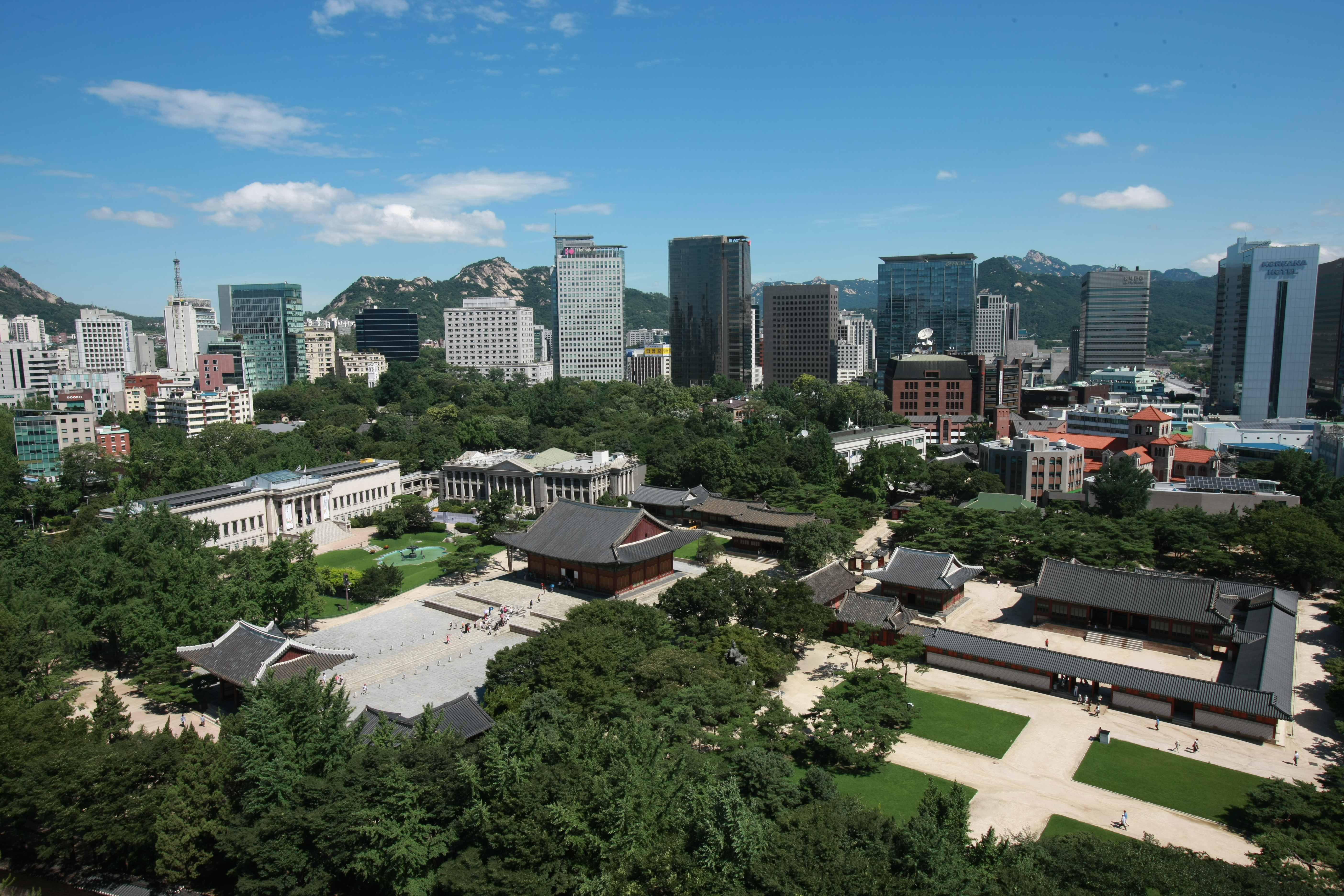 Photos of Seoul Metropolitan Fire & Disaster Headquarters